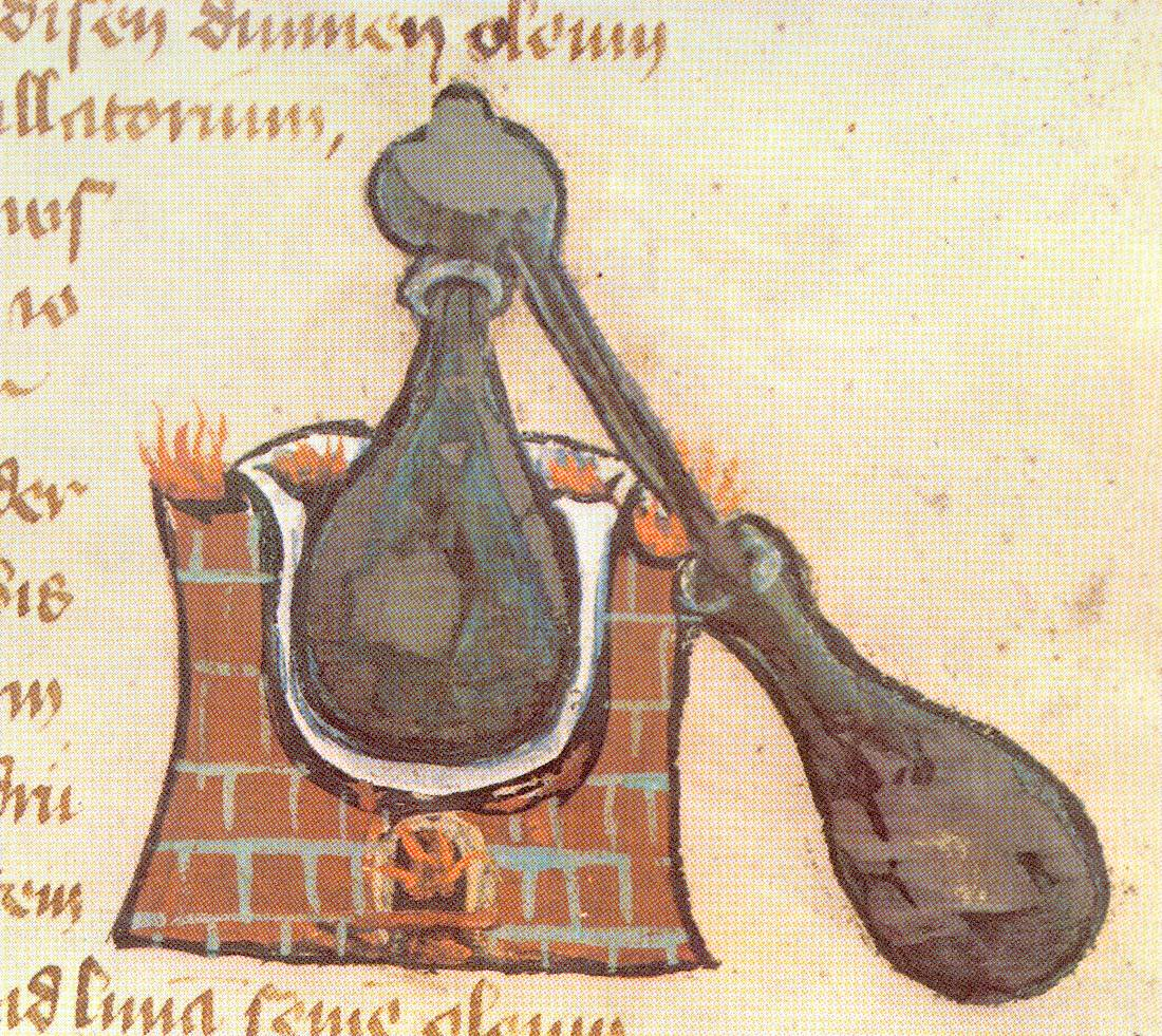 Alambic in einer mittelalterlichen Handschrift Sonstiges: ...